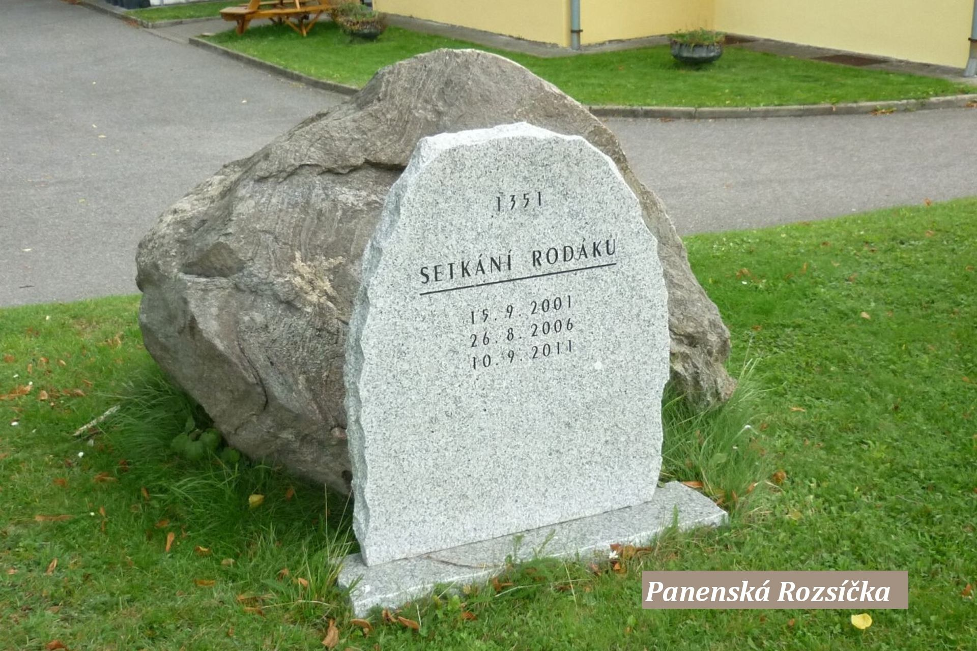 Památník setkání rodáků v Panenské Rozsíčce